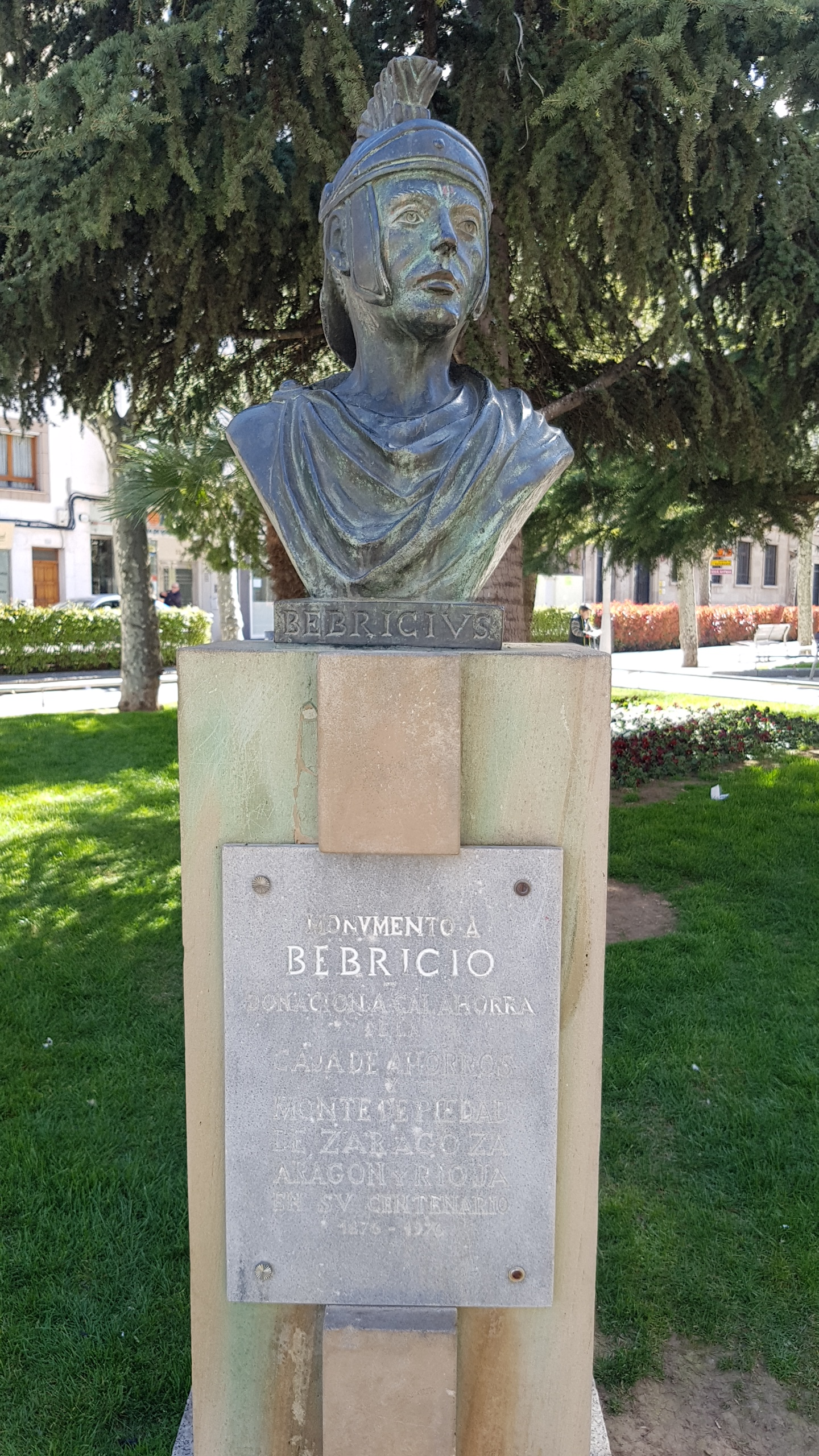 Foto de monumento a Bebricio en Calahorra, La Rioja, España